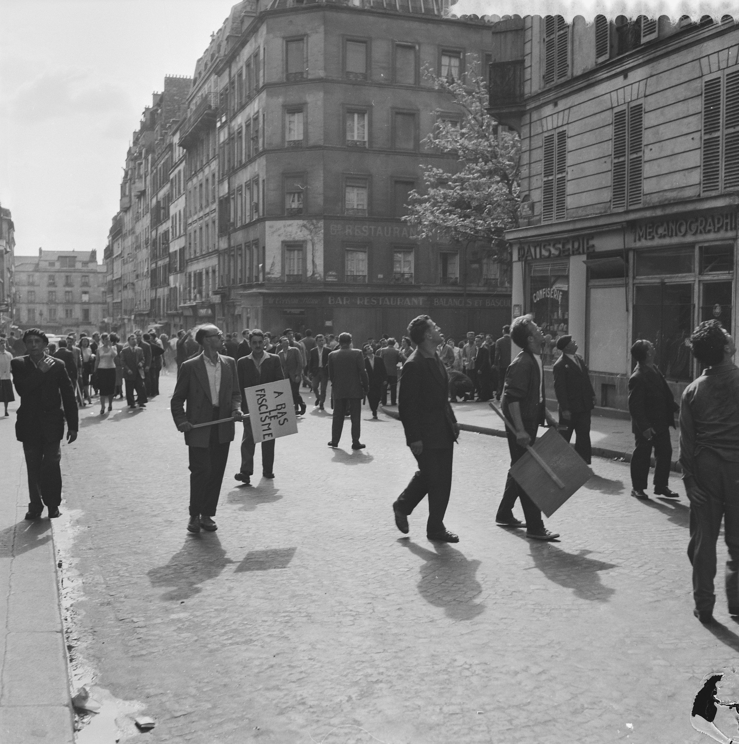 Collectie / Archief : Fotocollectie Anefo Reportage / Serie : [ onbekend ] Beschrijving : Demonstraties in Parijs tegen en voor De Gaulle Datum : 1 juni 1958 Locatie : Frankrijk, Parijs Trefwoorden : demonstraties Fotograaf : Behrens, Herbert / Anefo Auteursrechthebbende : Nationaal Archief Materiaalsoort : Negatief (zwart/wit) Nummer archiefinventaris : bekijk toegang 2.24.01.03 Bestanddeelnummer : 909-6029